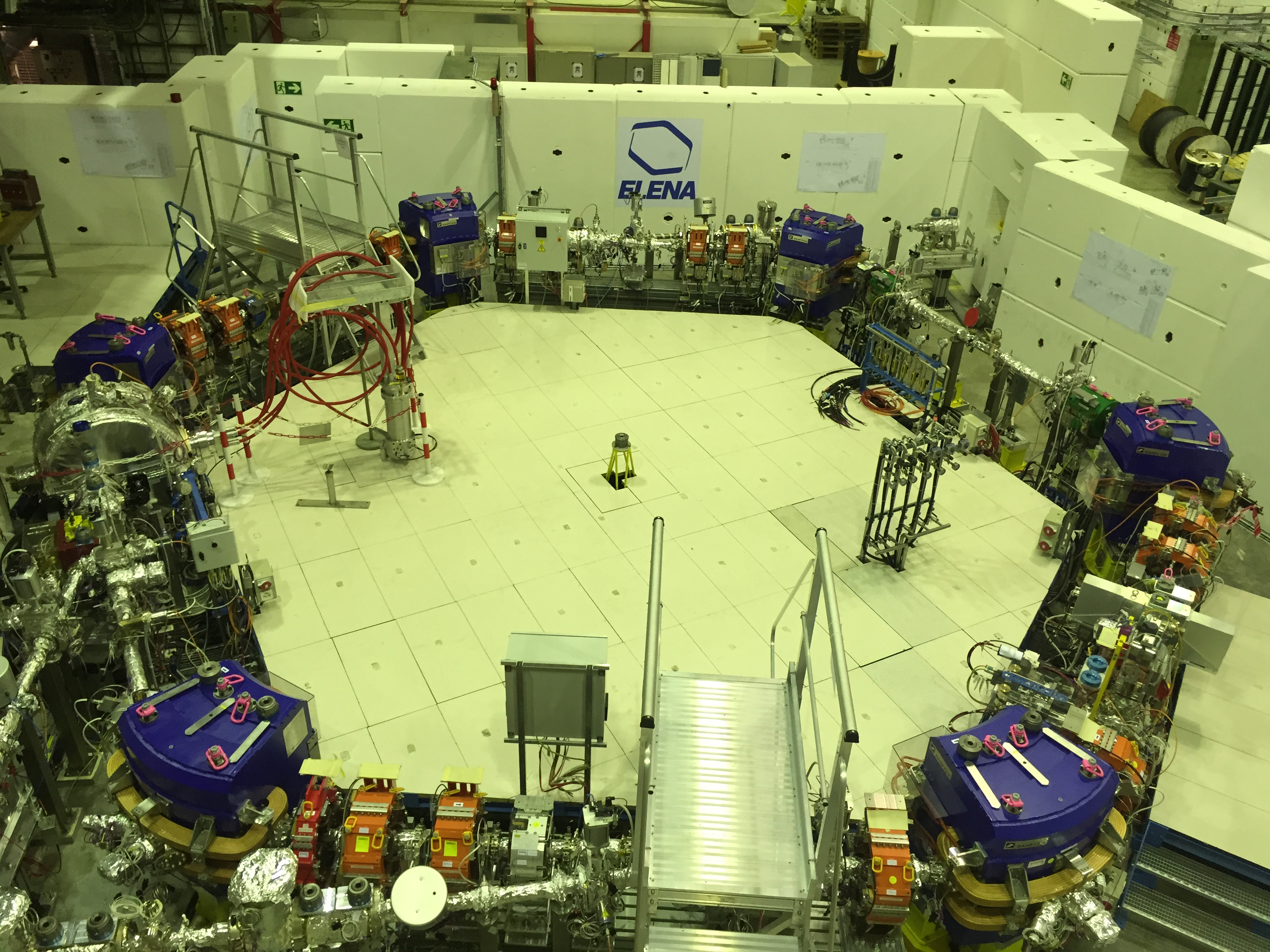 מאיץ האלנה